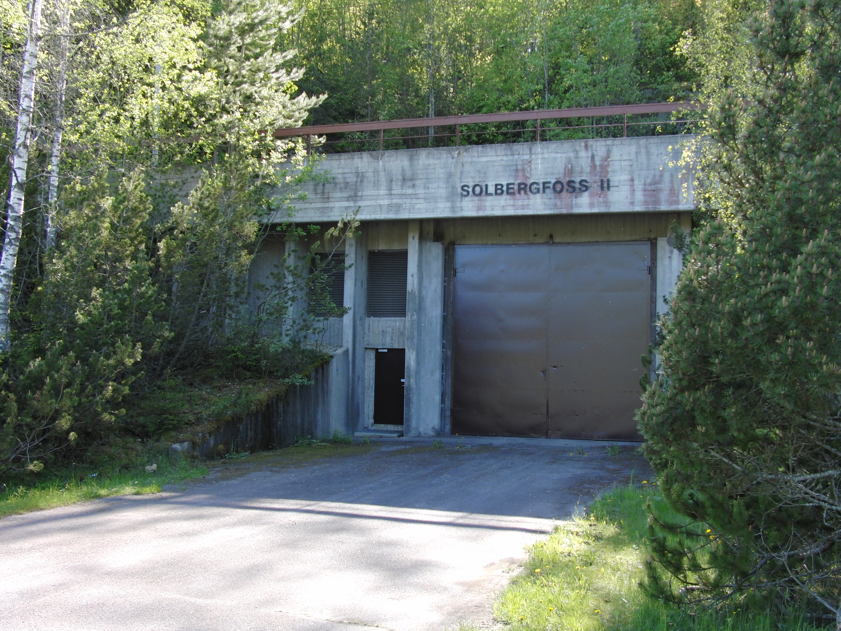 Solbergfoss II portal